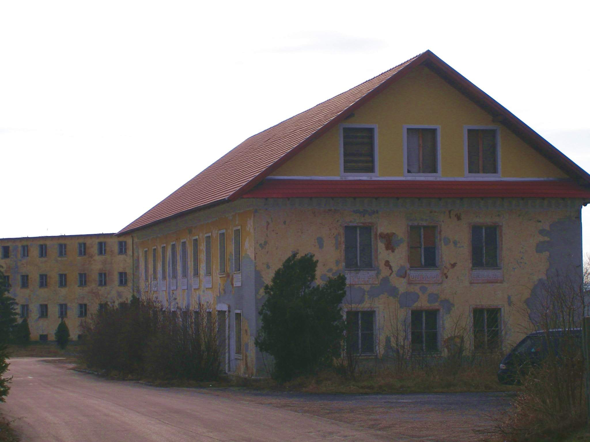 Baj - egykori katonai bázis (részlet)